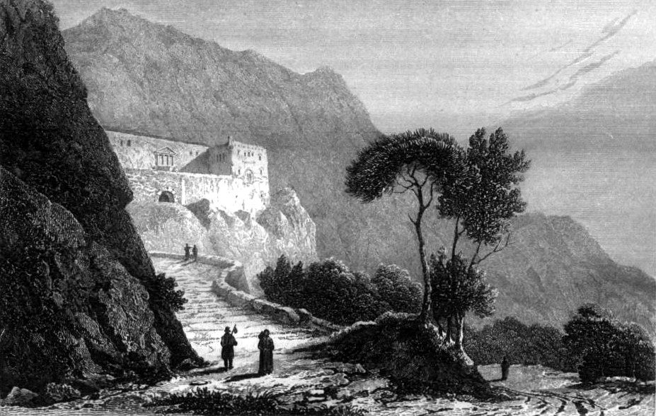 Image en provenance du livre : Eusèbe Girault de Saint-Fargeau, Guide pittoresque du voyageur en France, contenant la statistique et la description complète des quatre-vingt-six départements, orné de 740 vignettes et portraits gravés sur acier, de quatre-vingt-six cartes de départements et d'une grande carte routière de la France, par une Société de gens de lettres, de géographes et d'artistes, Paris, F. Didot frères, 1838, 6 volumes in-8° (BNF : 8-L25- 46). Volume III Didot frères, 1838. Route de Paris à Nice traversant les départements de l'Isère, des Hautes-Alpes, des Basses-Alpes et du Var. auteurs dessins : Rauch (ou autre) auteurs gravures : Skelton fils, Schroeder, Bishop (ou autre)